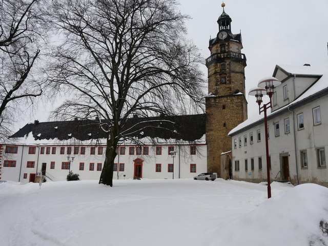 Ohrdruf. Schloss Ehrenstein.